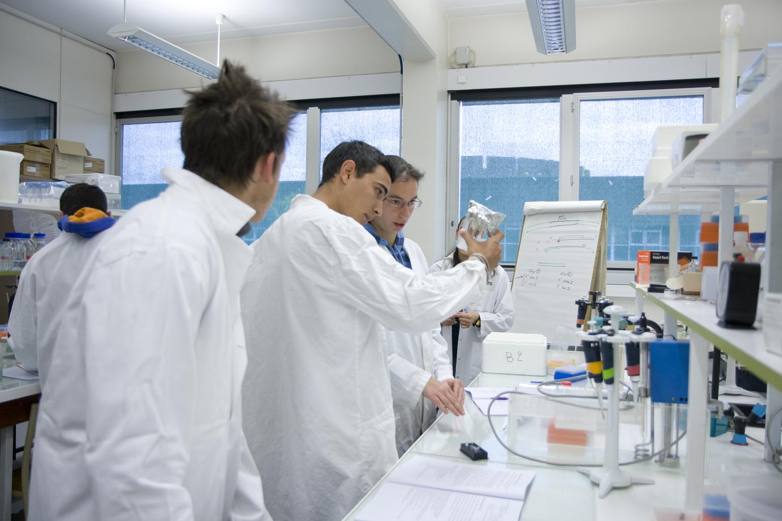 Laboratoire de l'École polytechnique